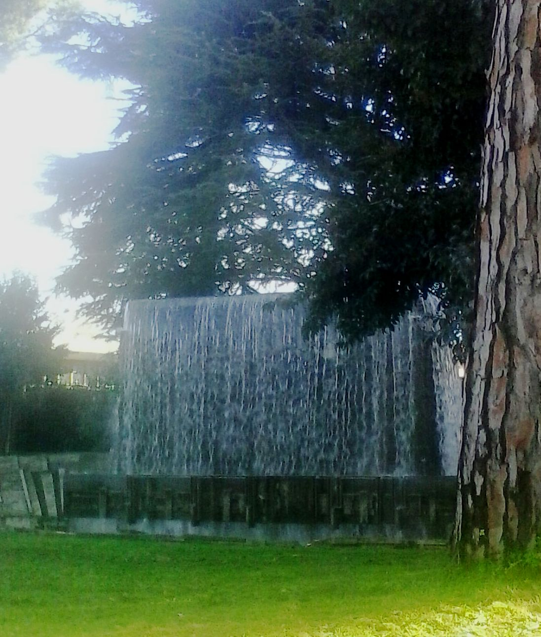 Realizzata nel 1962 da Ludovico Quaroni, Ugo Macrì e Americo Romitelli